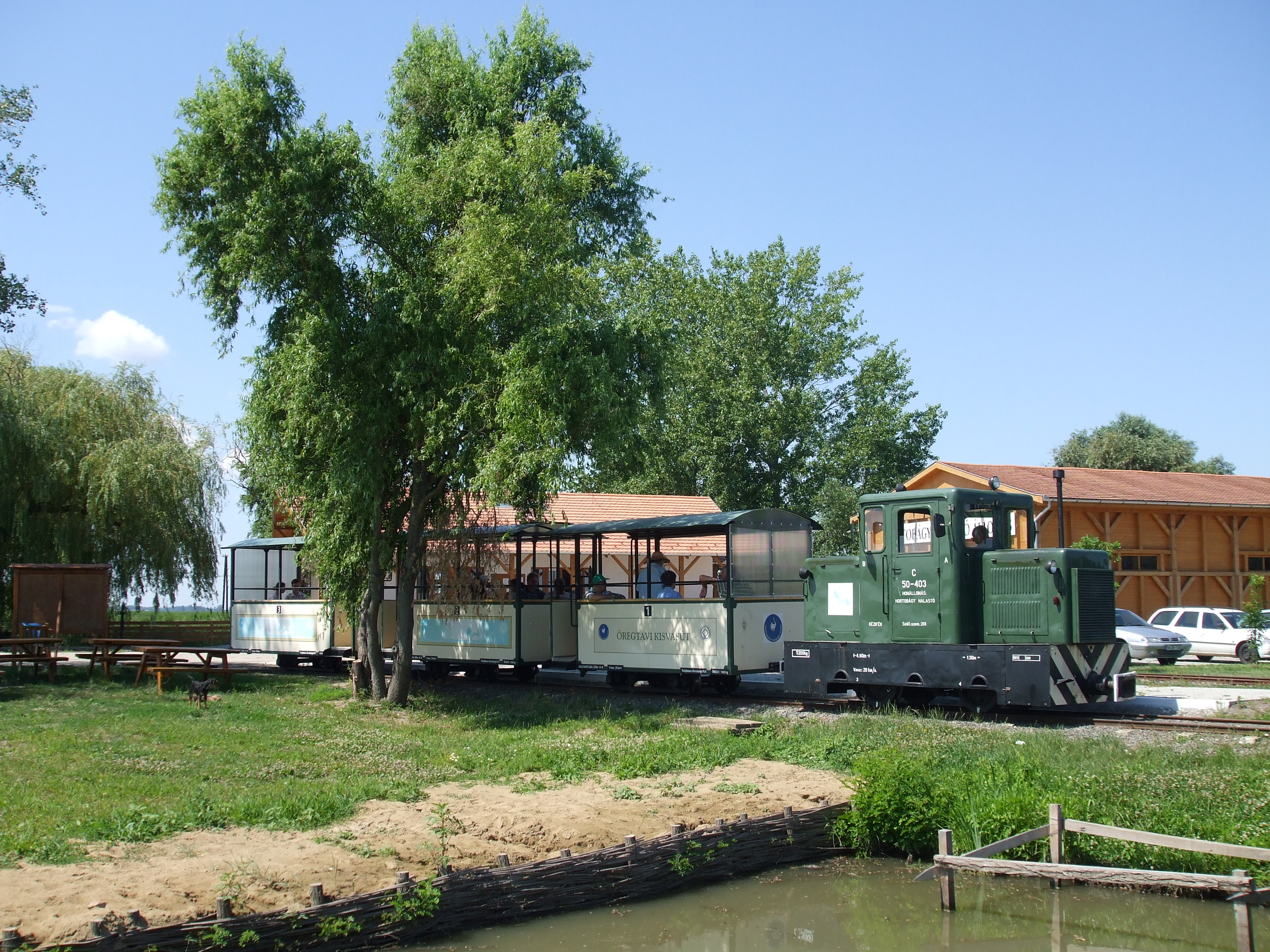 A Hortobágyi Kisvasút vonata Hortobágy-Halastó állomáson.